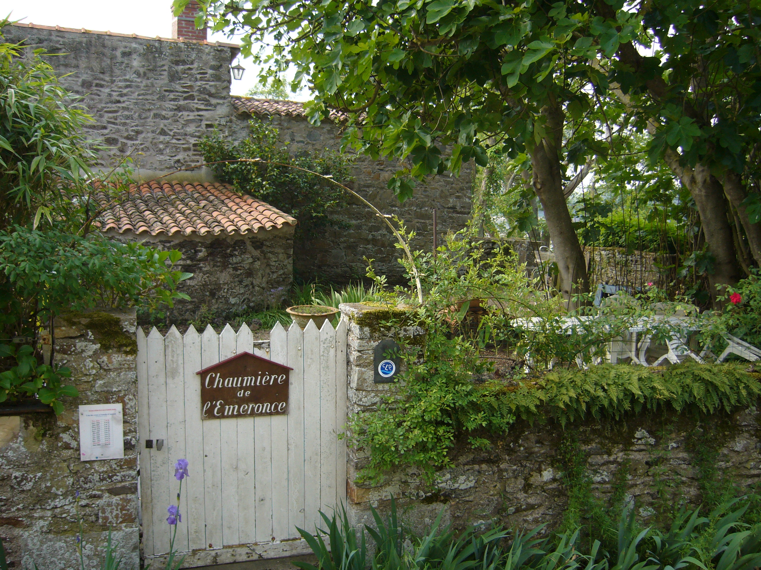 Maison, située sur la commune d'Anetz et au lieu-dit "les Cosniers", dans laquelle vécu l'écrivain Hervé Bazin de 1959 à 1960.